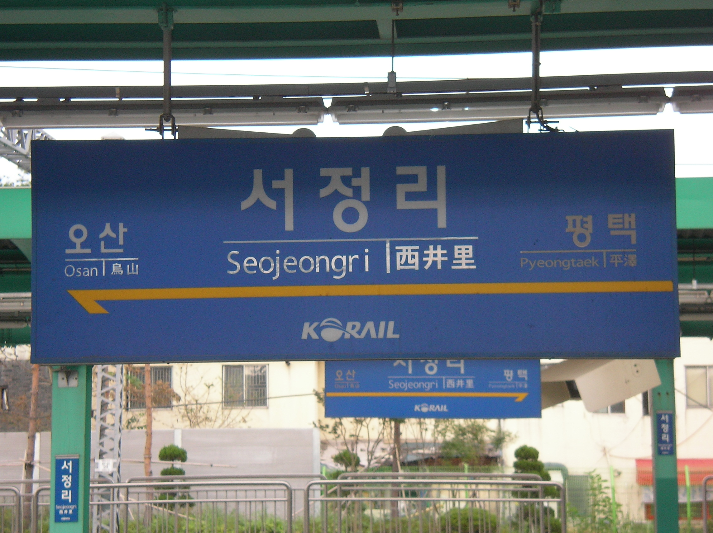 서정리역 역명판